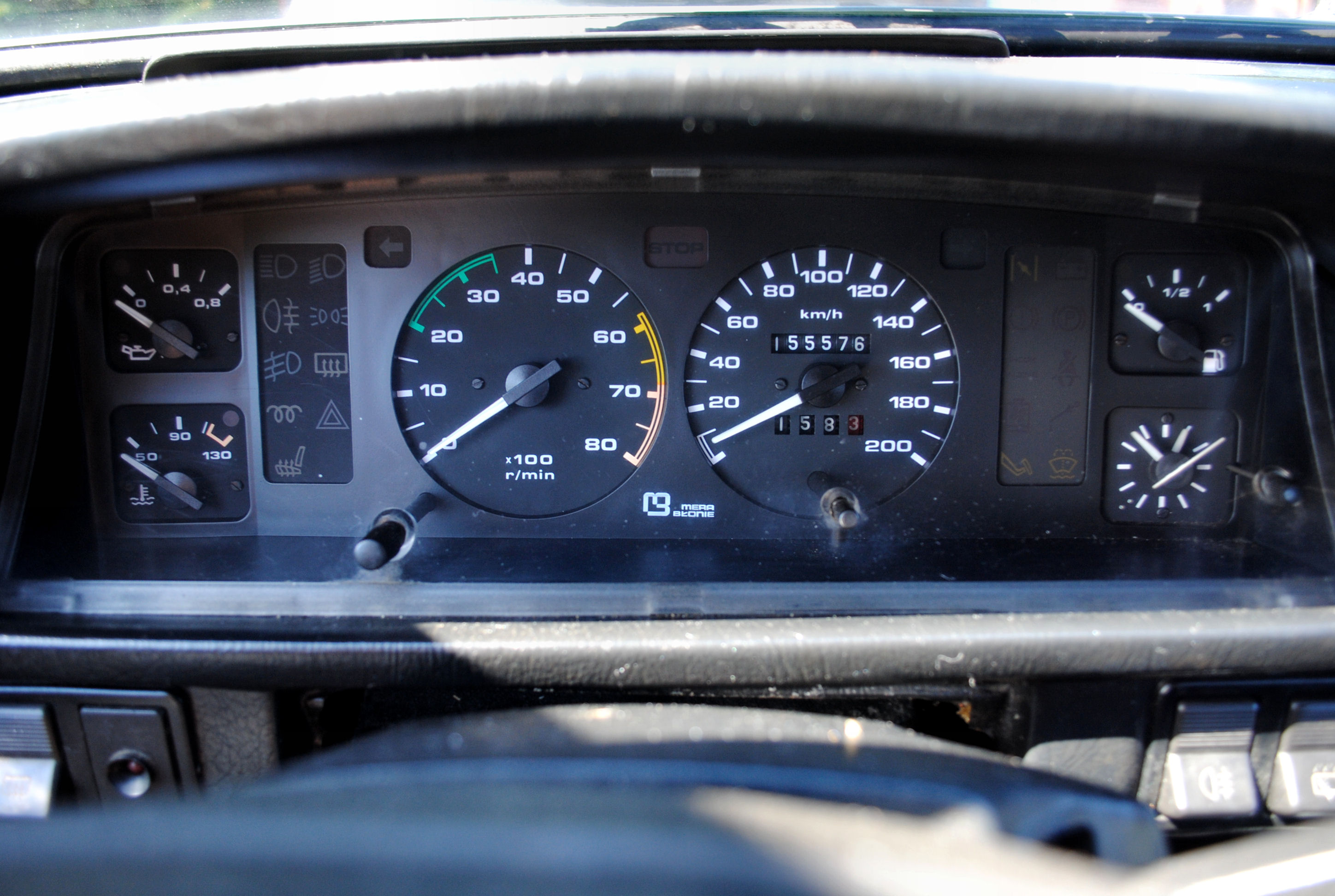 FSO Polonez Caro MR'93 1.5 GLE z roku 1994.